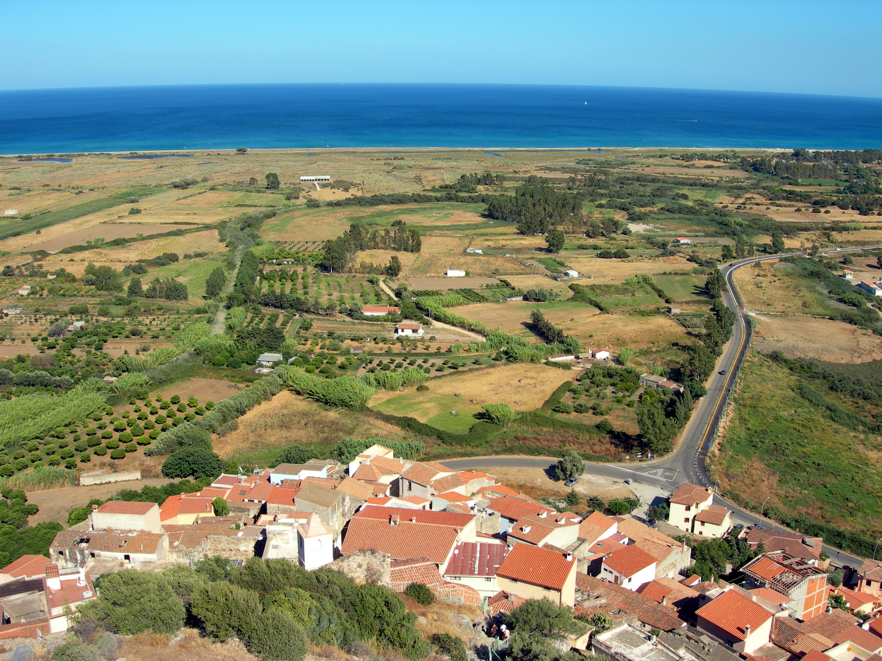 Posada, Sardegna, Italia